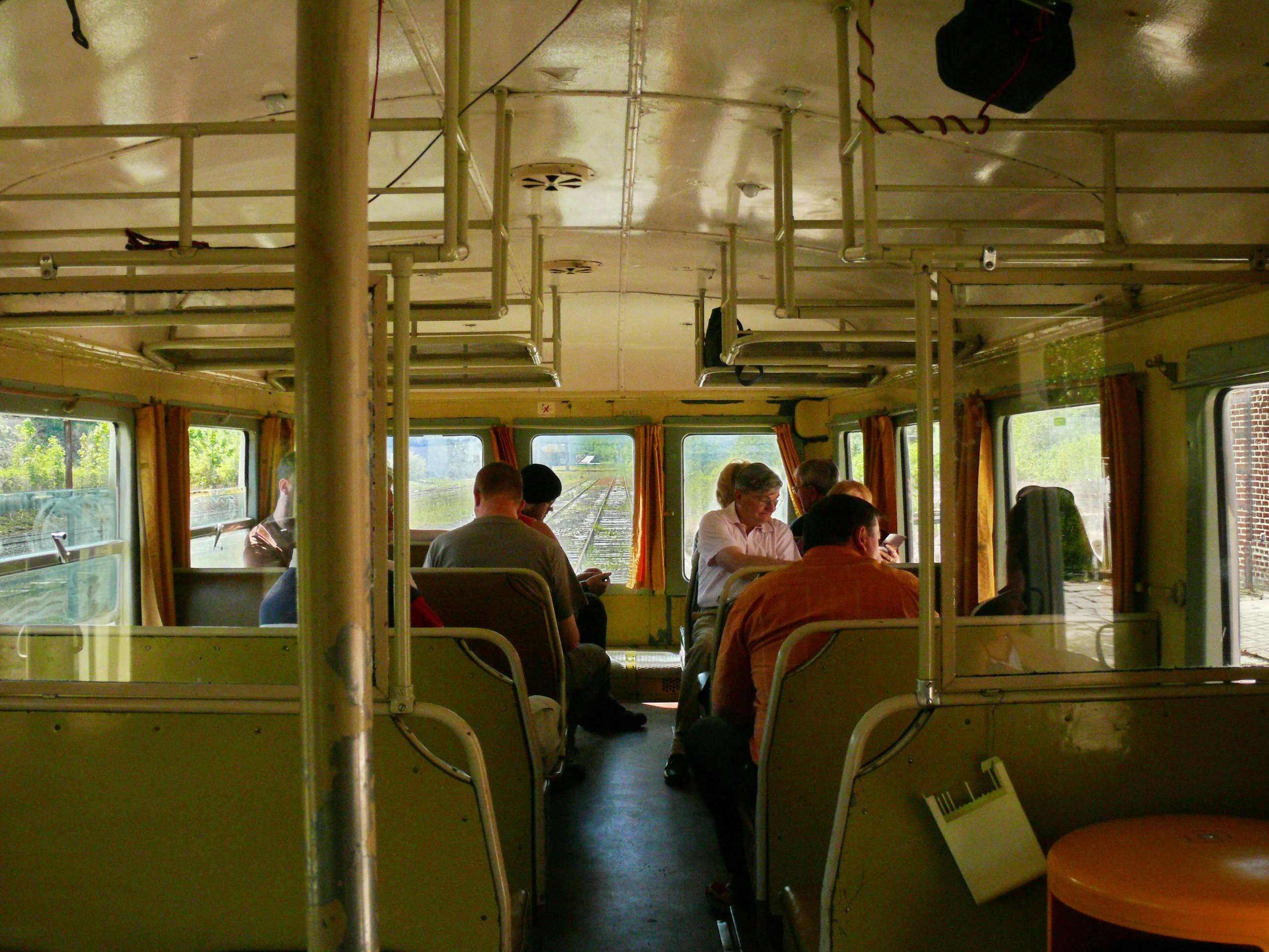 Aménagement du compartiment arrière de l'autorail X 3817, préservé par lr Chemin de fer touristique de la vallée de l'Aa. Les places devant les vitres frontales ont toujours été recherchées sur ce modèle d'autorail...